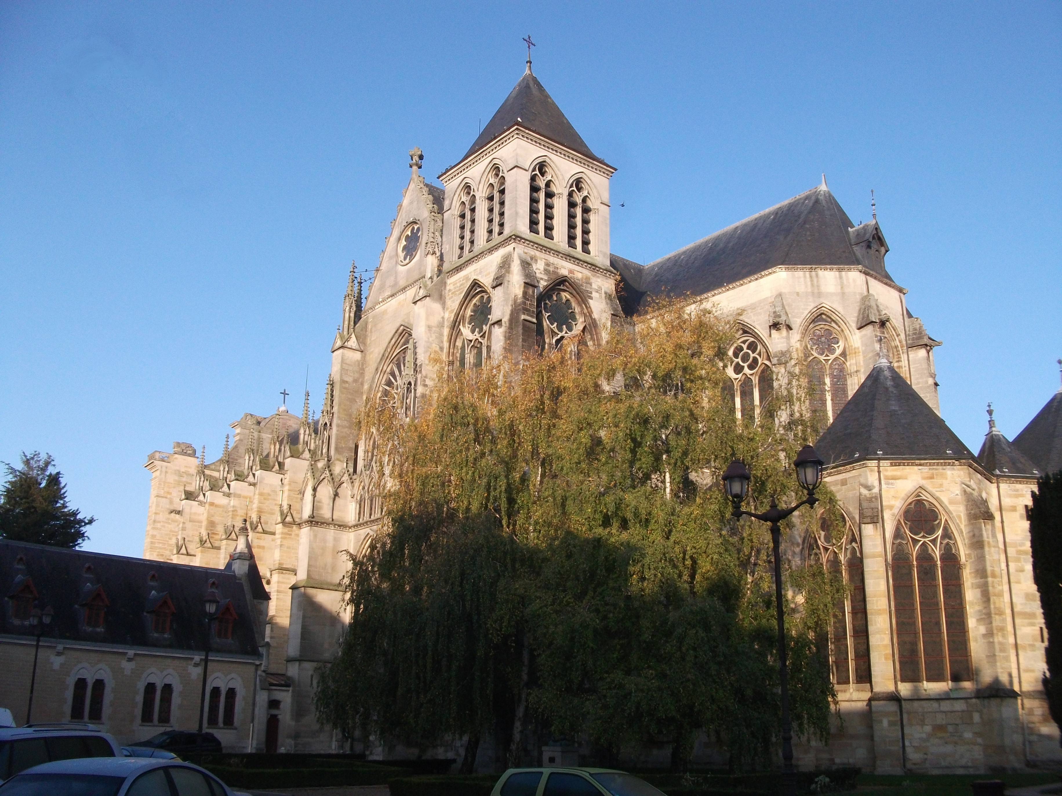 Vue depuis le sud est.